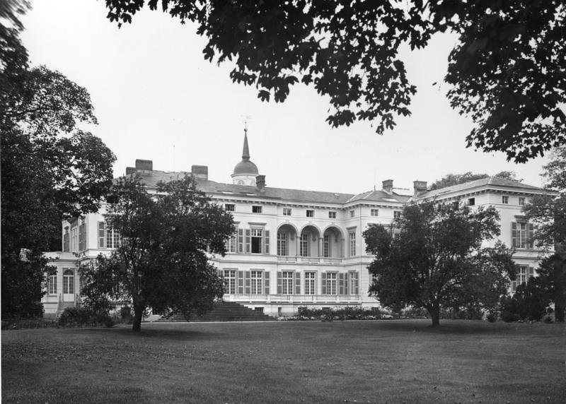 Haus des Bundeskanzlers (Palais Schaumburg), Bonn Koblenzer Straße. Ansicht aus Osten (aus dem Park)